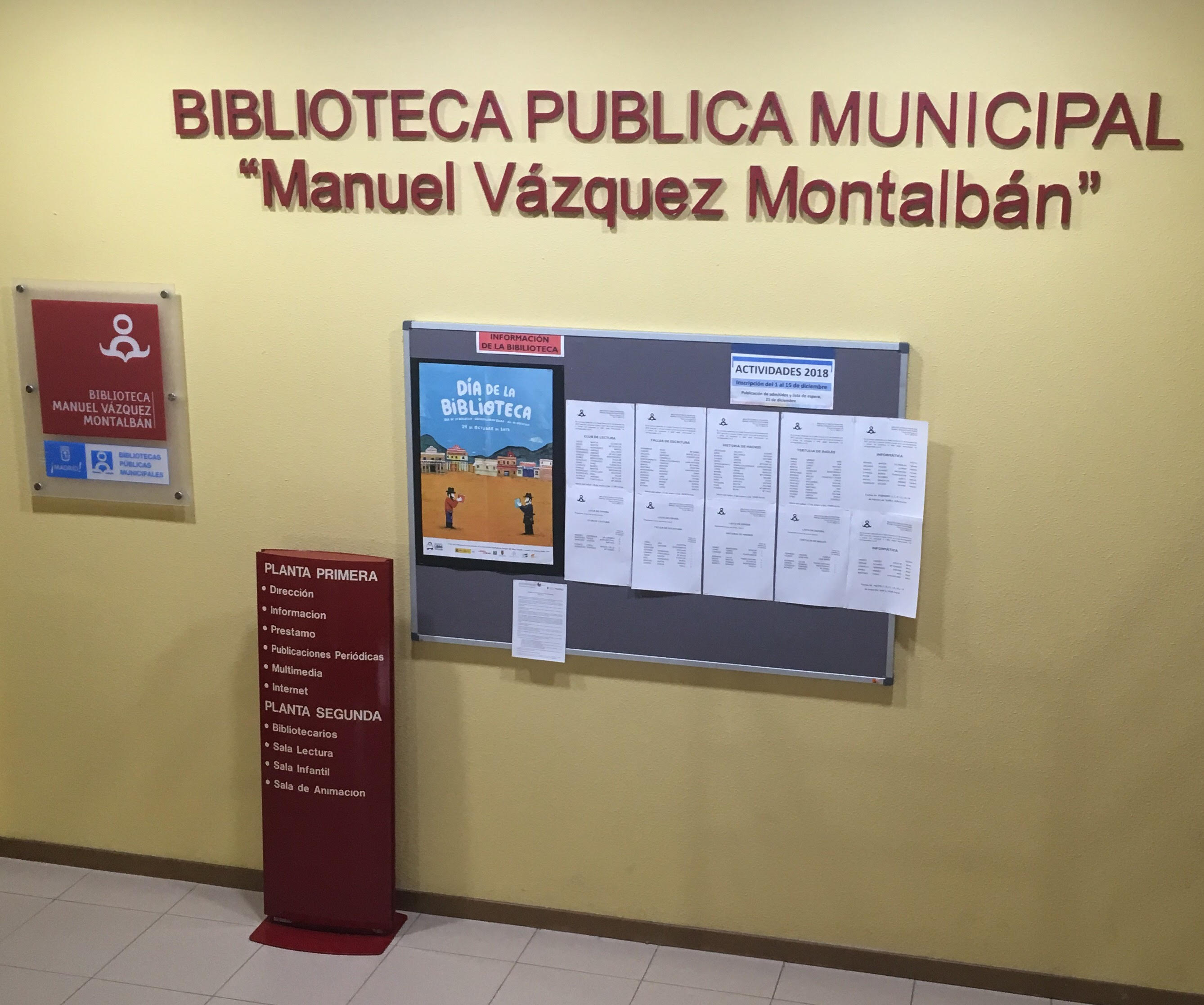 Foto del interior de la biblioteca pública Manuel Vázquez Montalbán